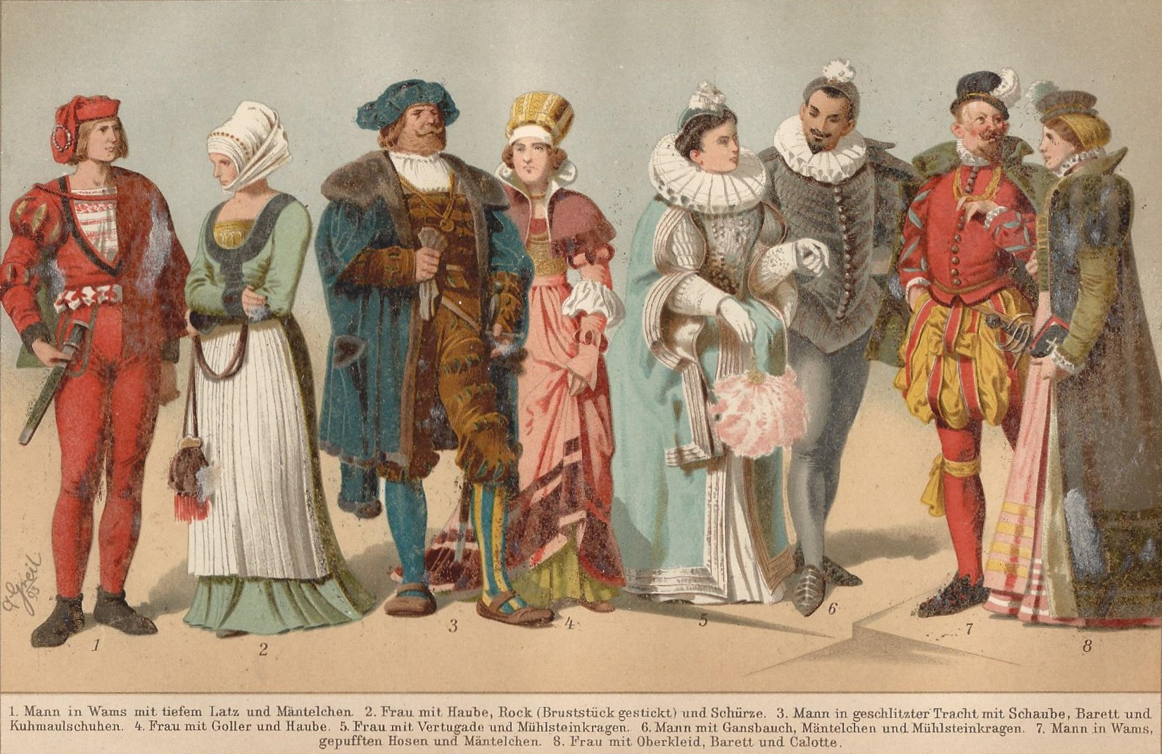 Kleidung („Kostüme“) des 16. Jahrhunderts